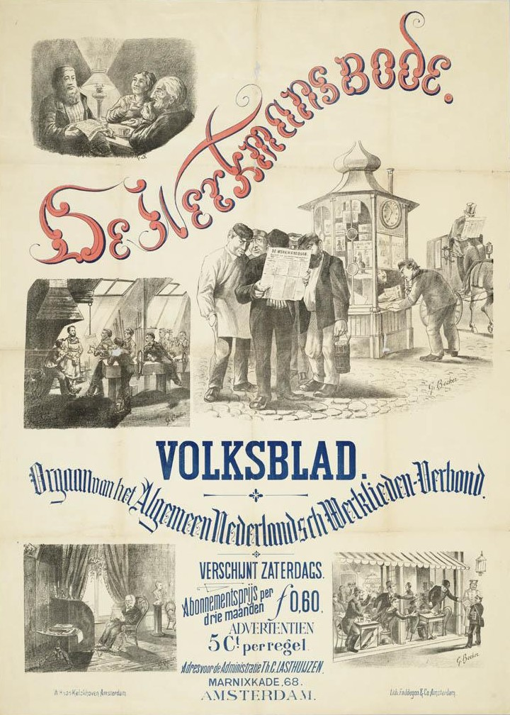 Affiche voor de Werkmansbode, orgaan van het Algemeen Nederlandsch Werklieden-Verbond